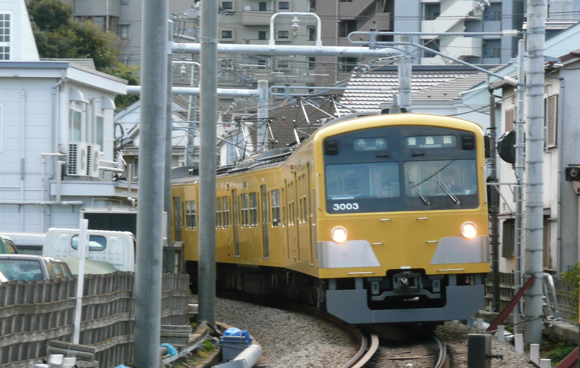 豊島園駅へ向かう西武豊島線の電車